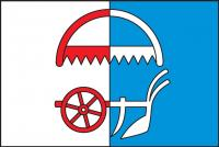 vlajka Hříšice